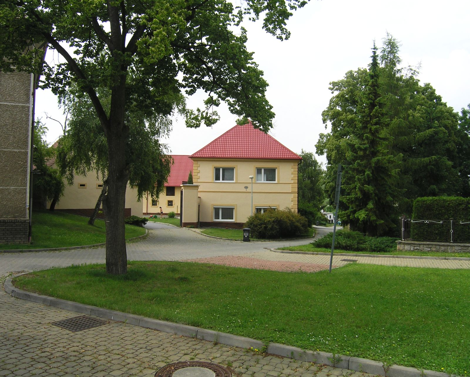 Pod Lípou square at Praha-Holyně Náměstí Pod Lípou v Praze-Holyni